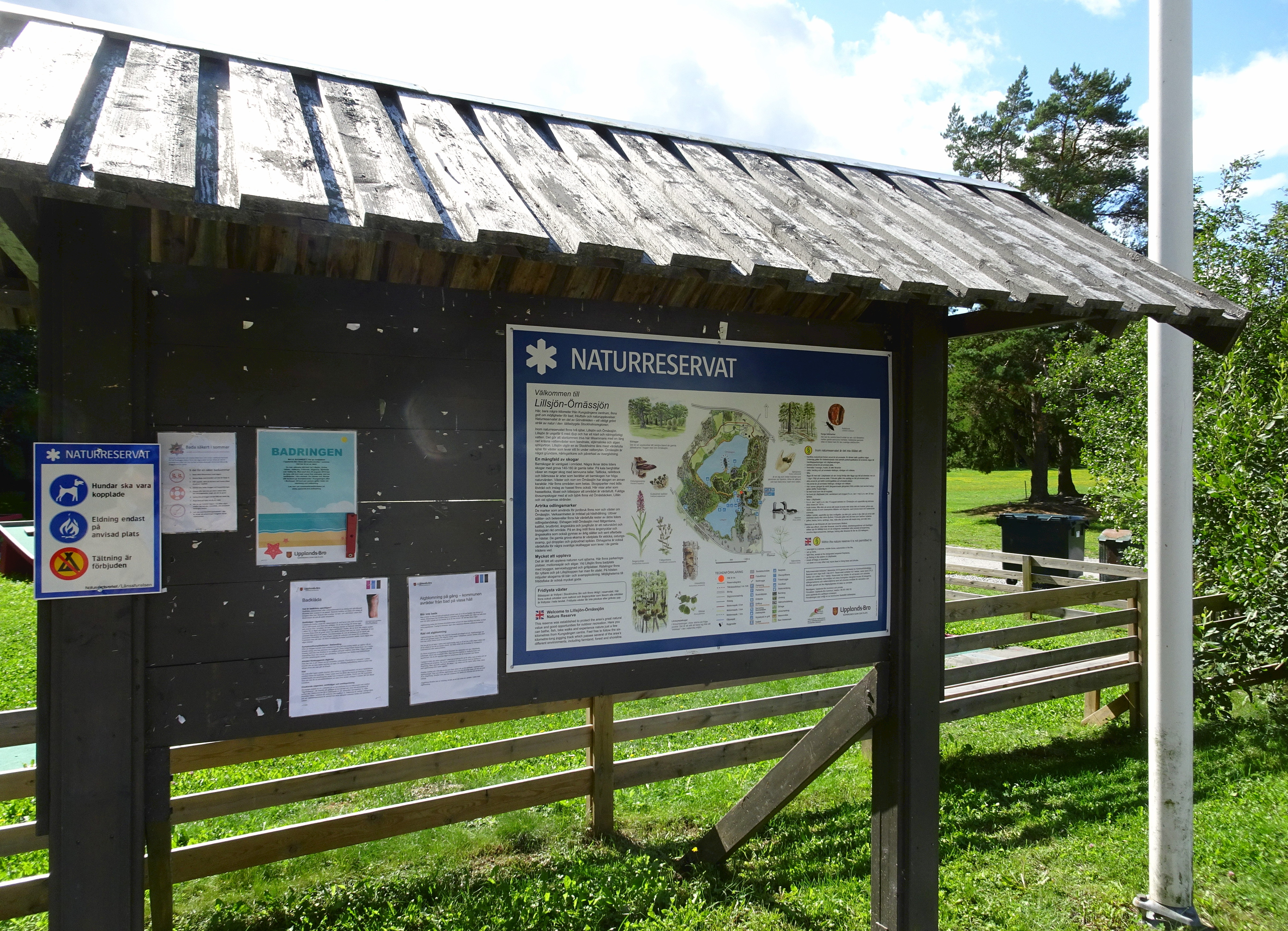 Infoskylt vid Lillsjöbadet i Lillsjön-Örnässjöns naturreservat